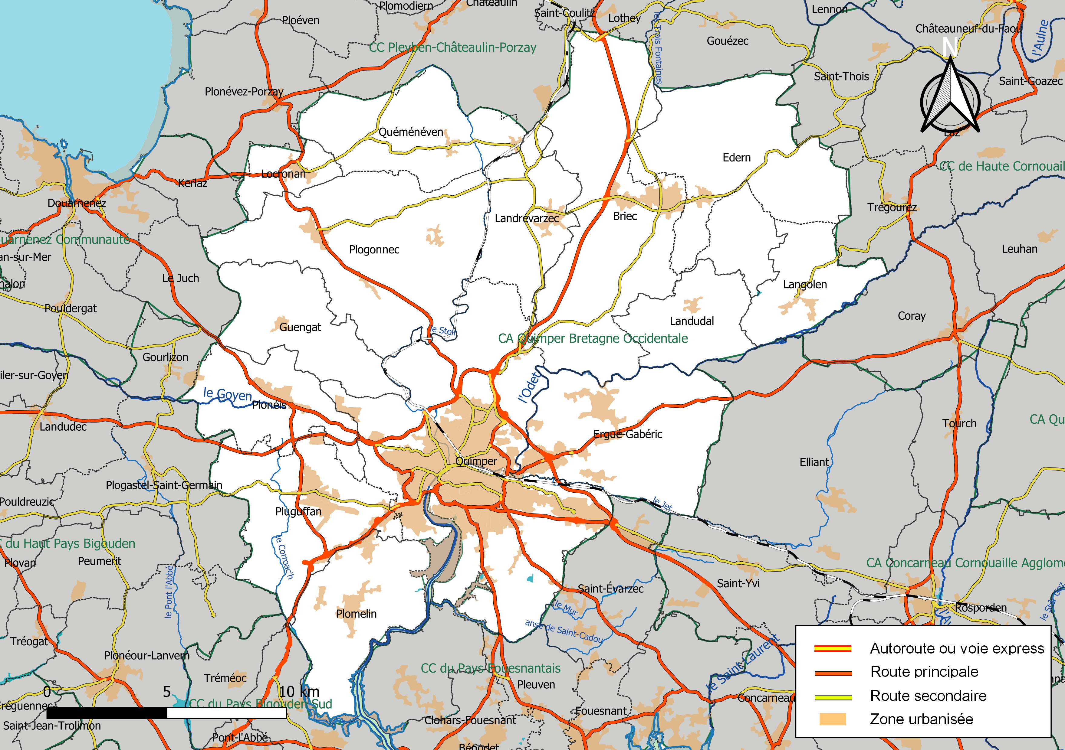 Carte géographique de la Communauté d'agglomération Quimper Bretagne Occidentale, département du Finistère, France. Composition au 1er janvier 2019.